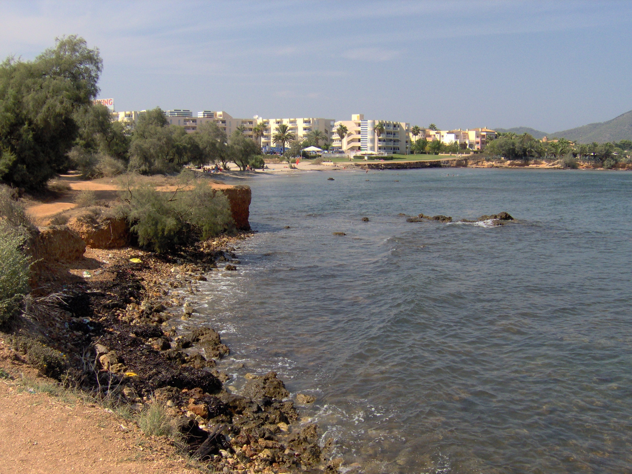 Strand zwischen Cala Bona und Port Nou im August 2006